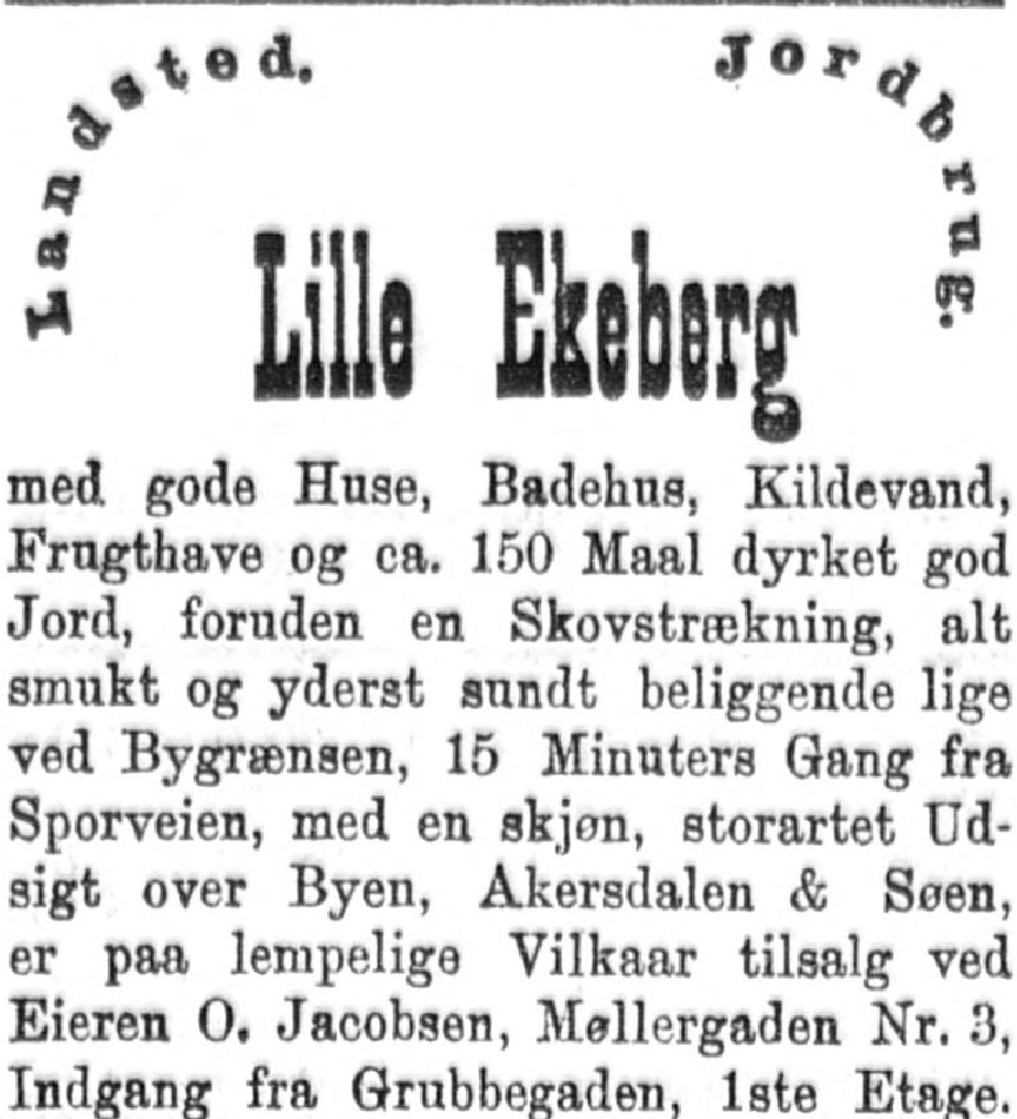 Salgsannonse for Lille Ekeberg Aftenposten 1883